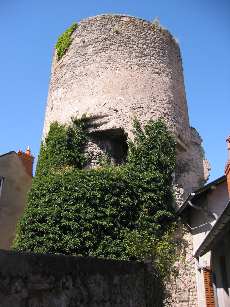 Jaligny-sur Besbre (France) - La vieille tour, vestige des fortifications de la ville